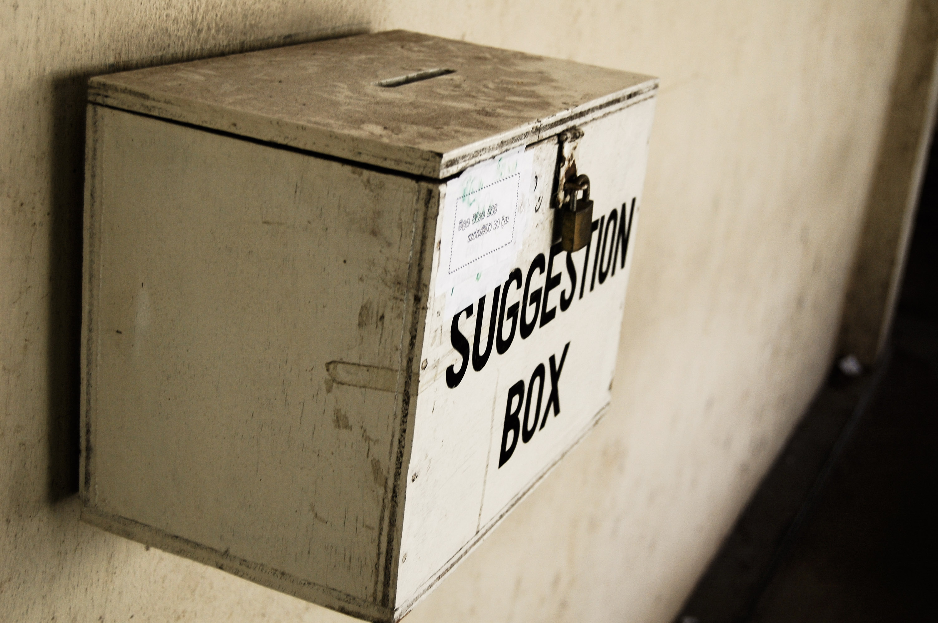 suggestion box in Sri Lanka